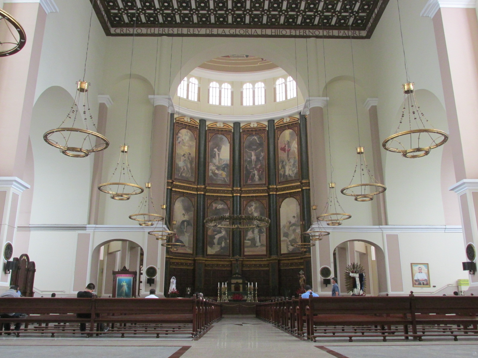 La catedral es la principal arquidiócesis católica de San Salvador y está ubicada en el kilómetro cero, corazón de la capital.